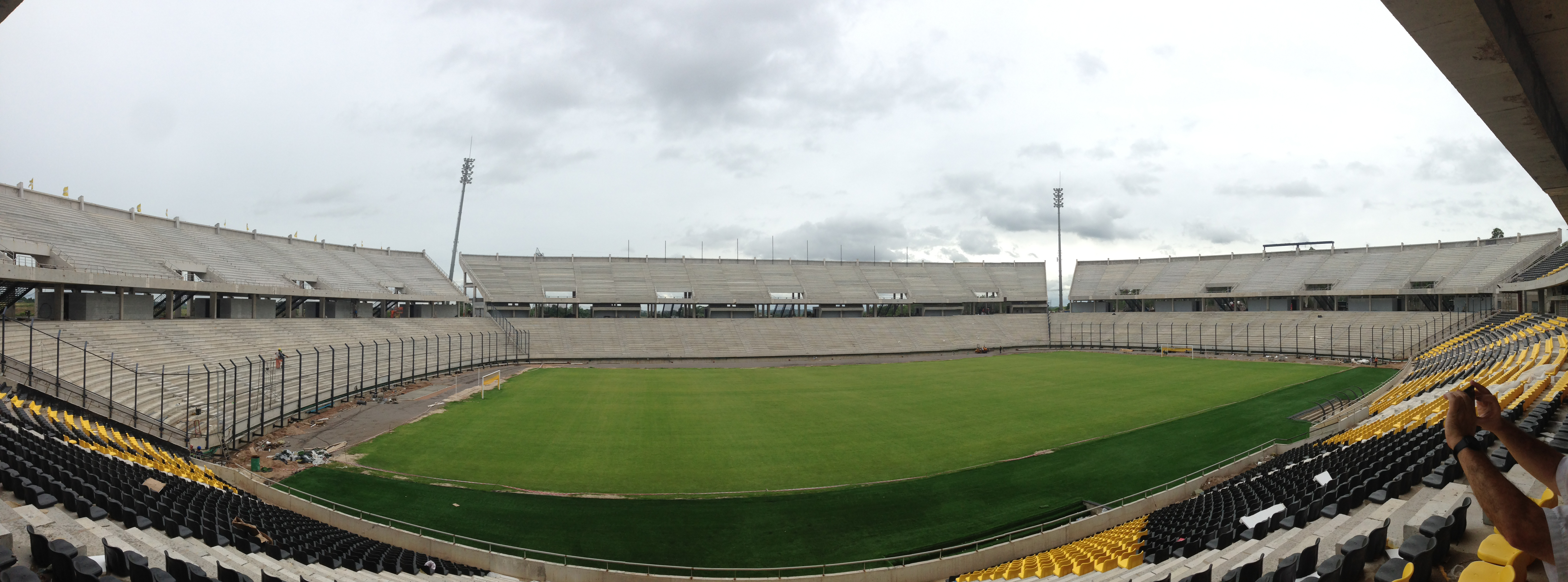 Estadio del Club Atlético Peñarol. Arquitecto Luis Rodríguez Tellado. Ubicación Ruta 102 (Ruta Nacional Perimetral Wilson Ferreira), Camino Manganga y Camino de los Siete Cerros, Montevideo, Uruguay. Vista desde tribuna Oficial (tribuna norte).